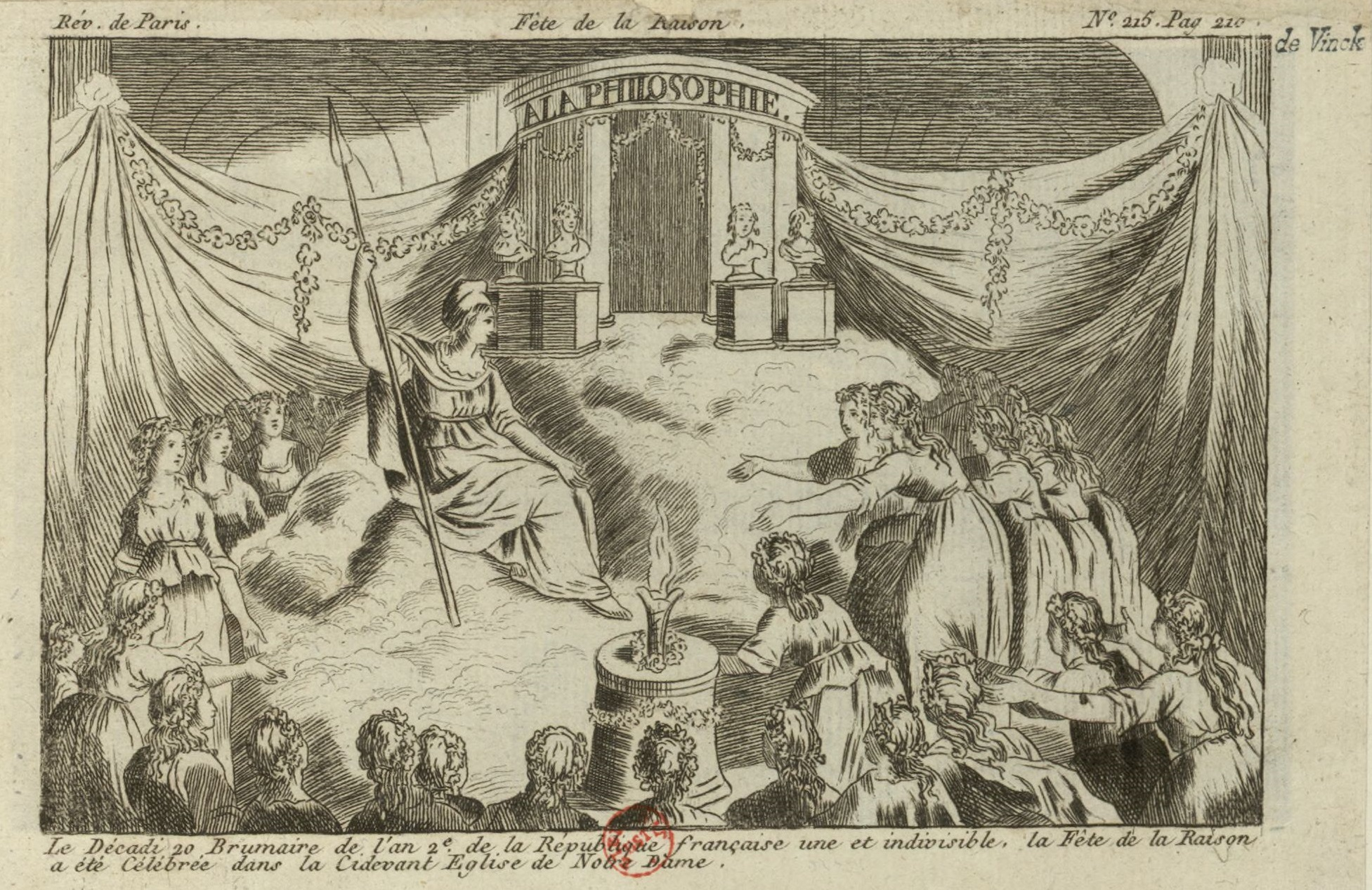 Dans un décor d'inspiration antique, où disparaît toute référence à la cathédrale Notre-Dame de Paris, quelques jeunes filles, prêtresses de la philosophie, célèbrent le culte à la déesse "Raison", personnifiée par une jeune femme vêtue d'une tunique drapée et d'un bonnet phrygien.